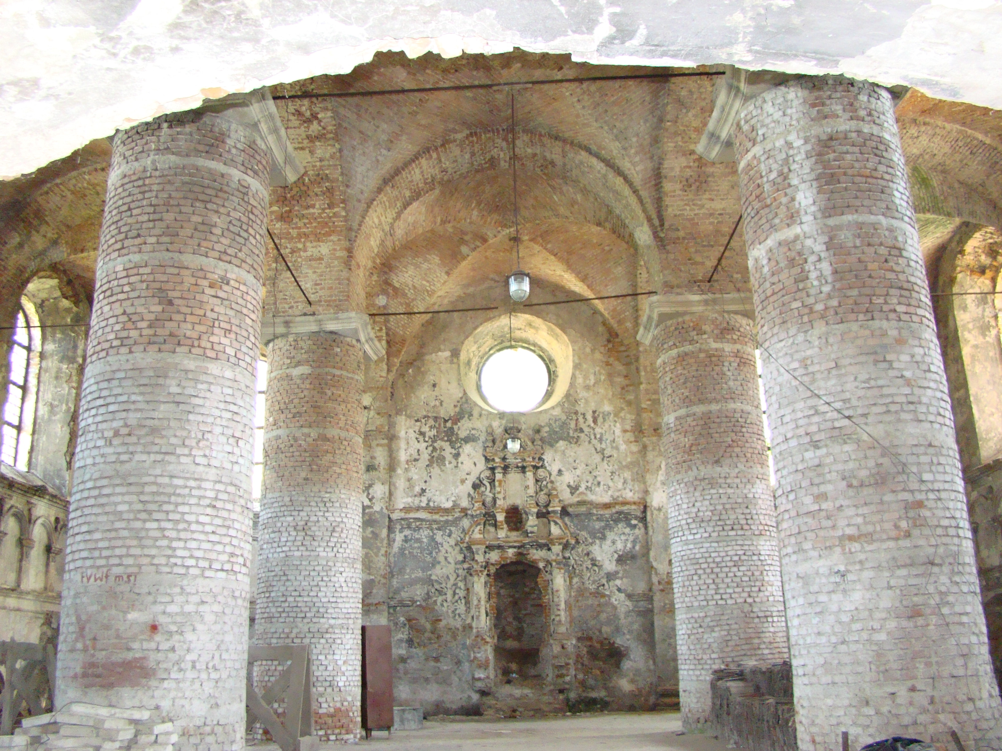 Синагога (мур.), Жовква, вул.Запорізька